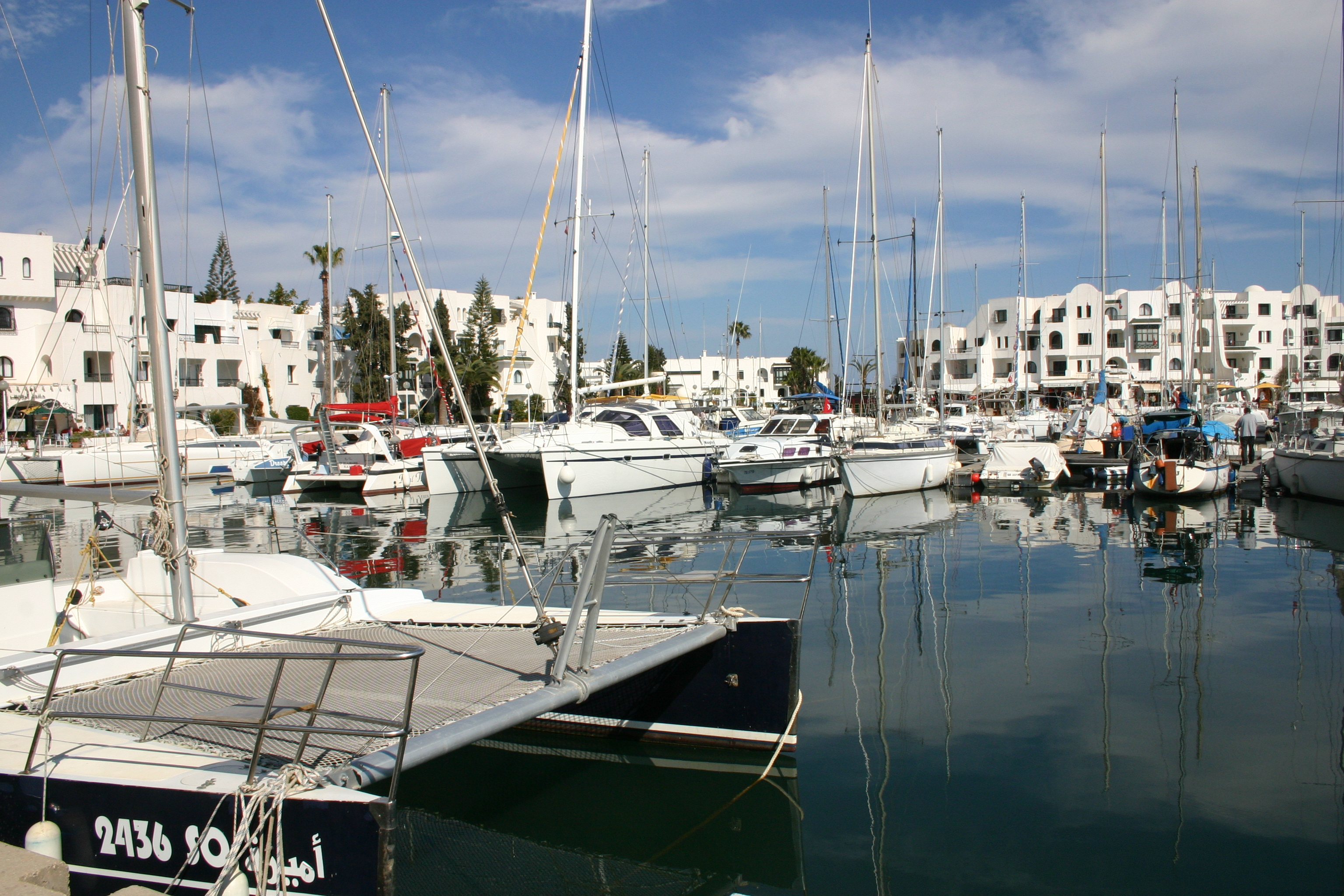 Port El Kantaoui Marina, Sousse, Tunisia.